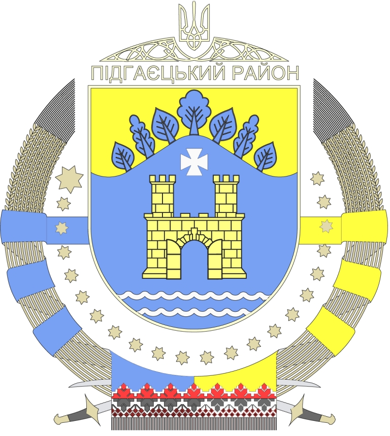 Герб Підгаєцького району